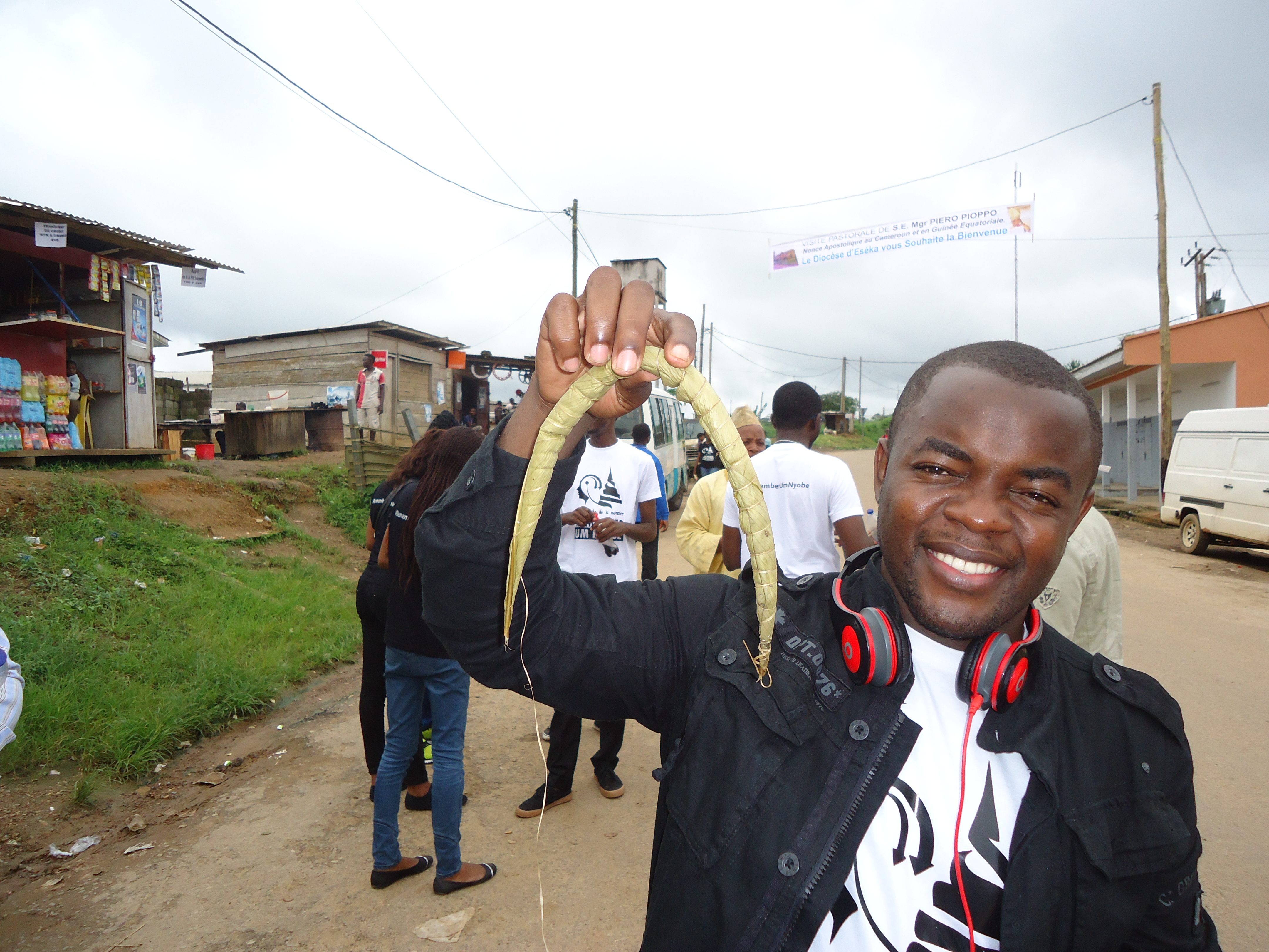 Un des féculents qui ne manquent jamais à Eseka